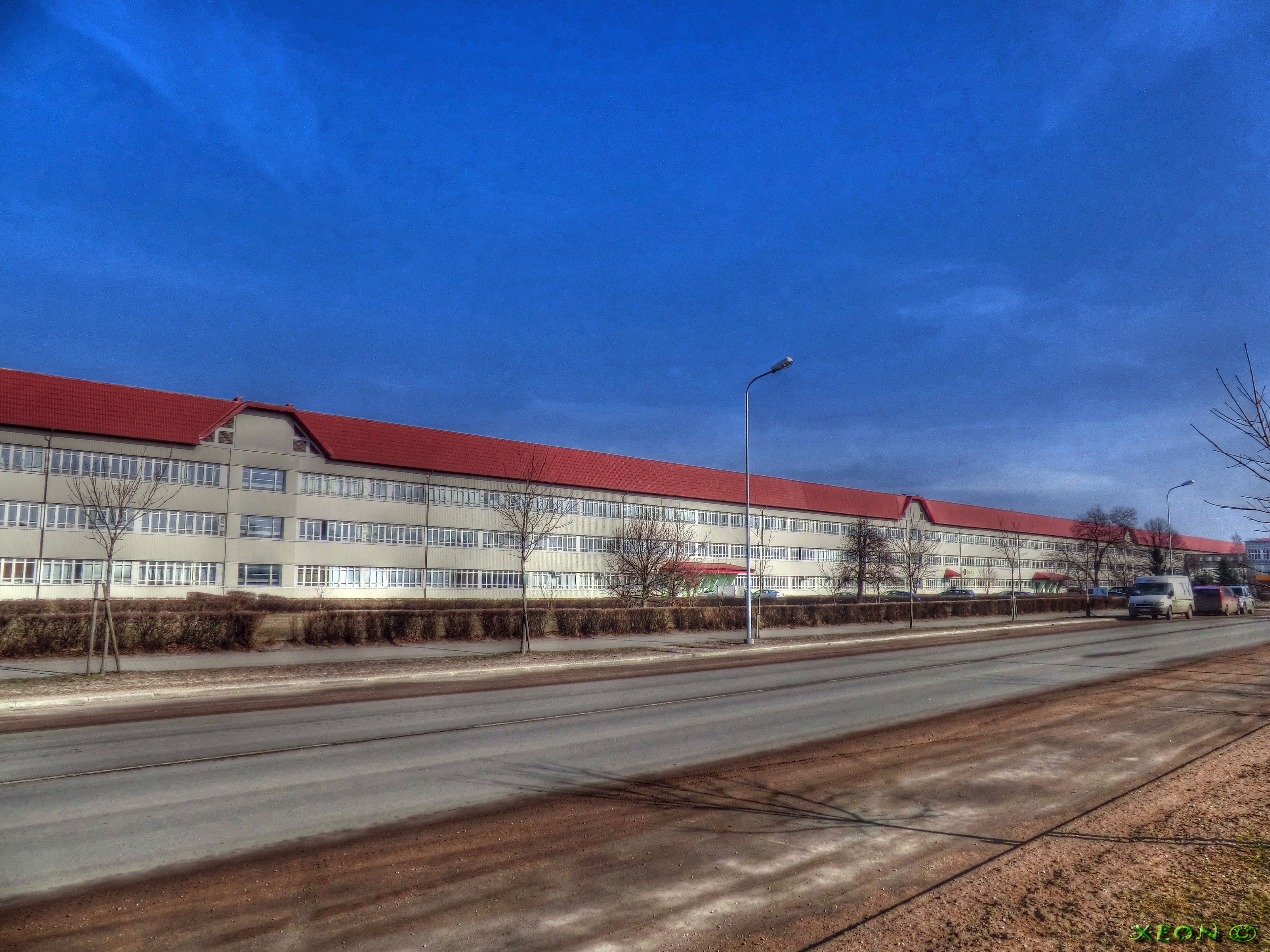 Lauma Fabric 2013